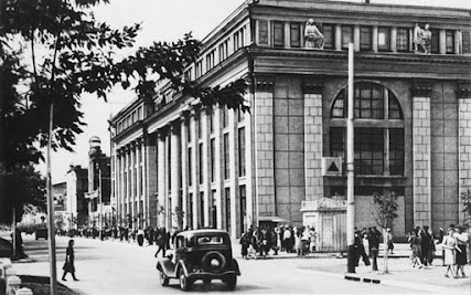 ЦУМ у Дніпропетровську з боку площі Леніна у 1939 році.